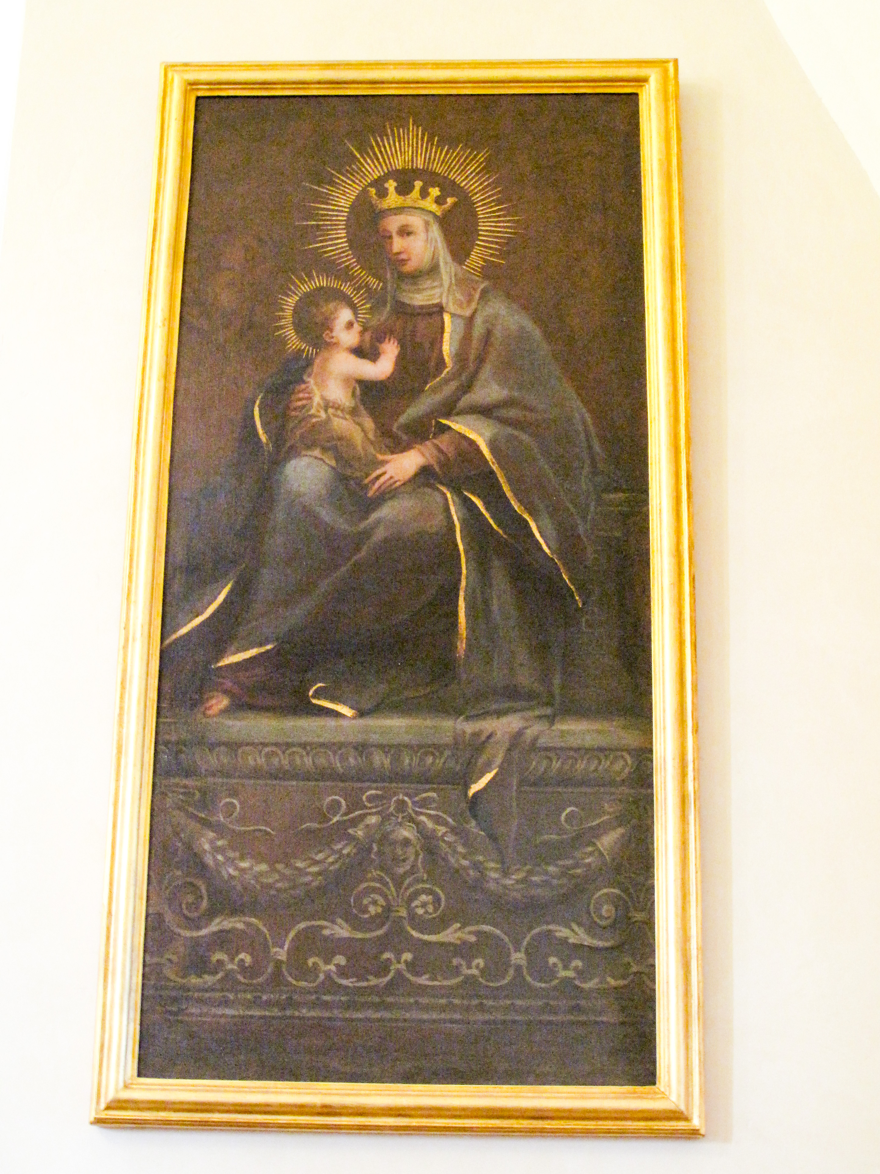 Vicenza - Chiesa di San Vincenzo - Madonna in trono che allatta il Bambino